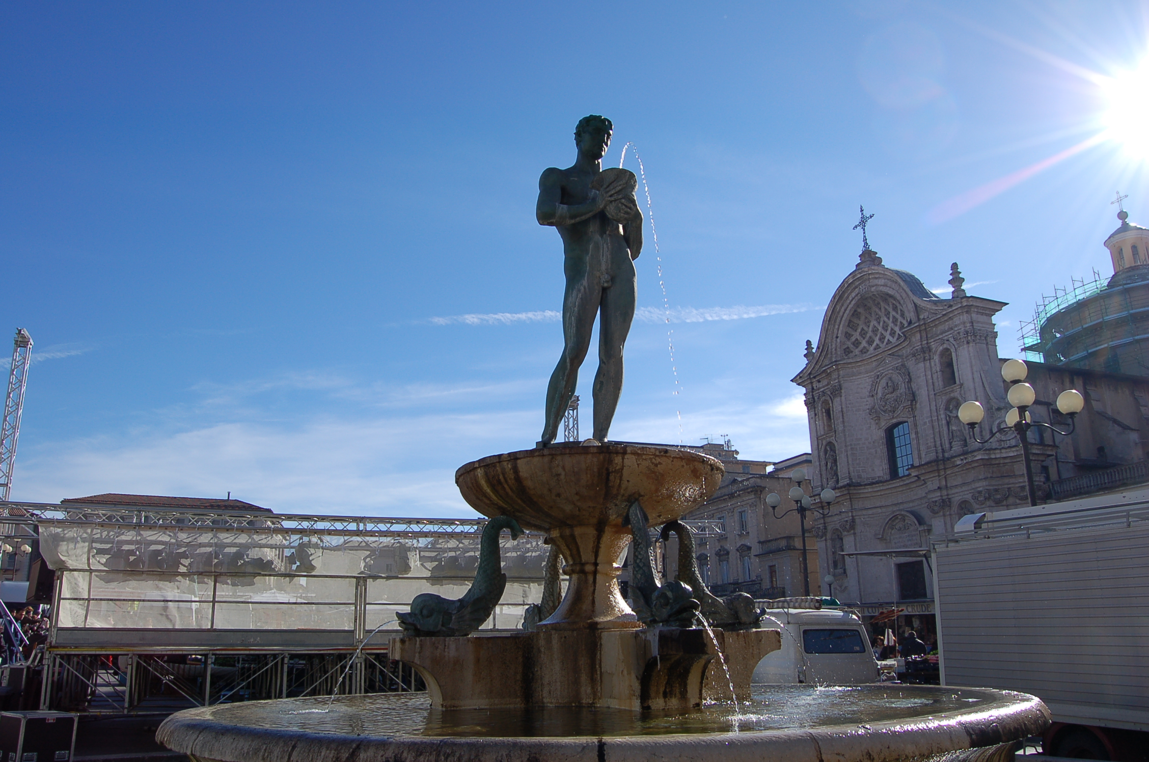 Piazza Duomo - L'Aquila, Italia